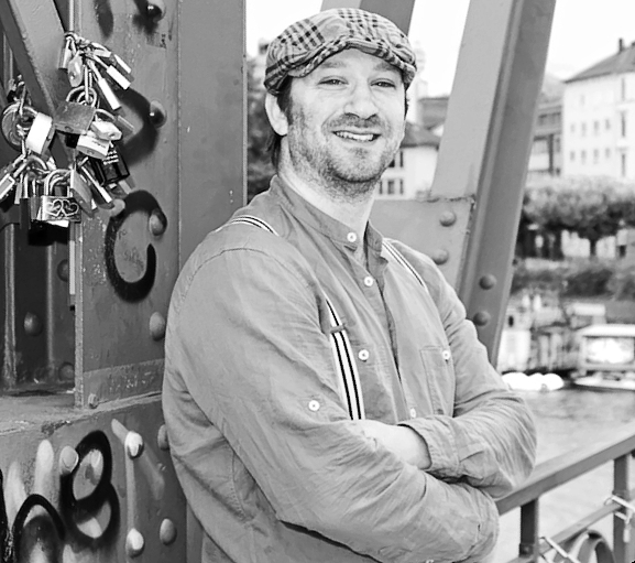 Jannis Plastargias (* 1975), griechisch-deutscher Diplom-Pädagoge, Kulturaktivist, Autor und Blogger.(Aufnahmedatum: 19.7.2012; Ort: Eiserner Steg (mit sogenannten Liebesschlössern) in Frankfurt am Main; Foto: Corinna Kaiser (CocoUniVersum))